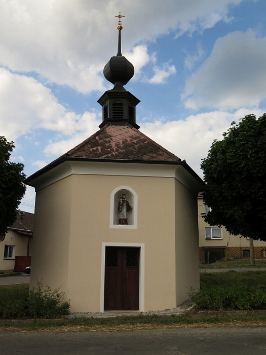 Kaple, náves, Libákovice.